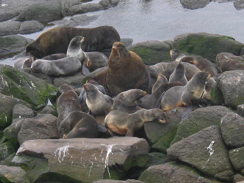 Callorhinus ursinus